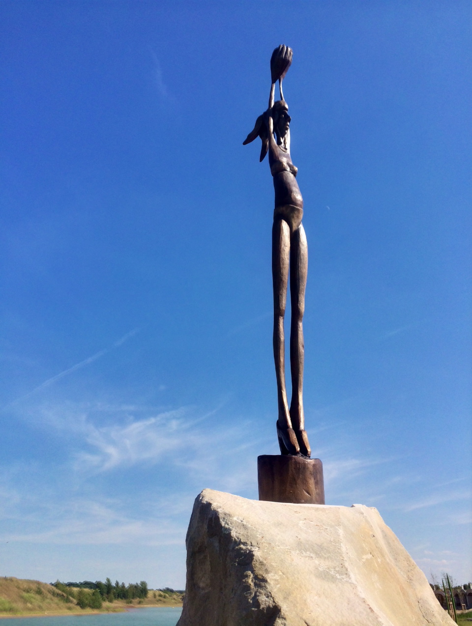 Bella Gruna am Störmthaler See - Magdeborner Halbinsel